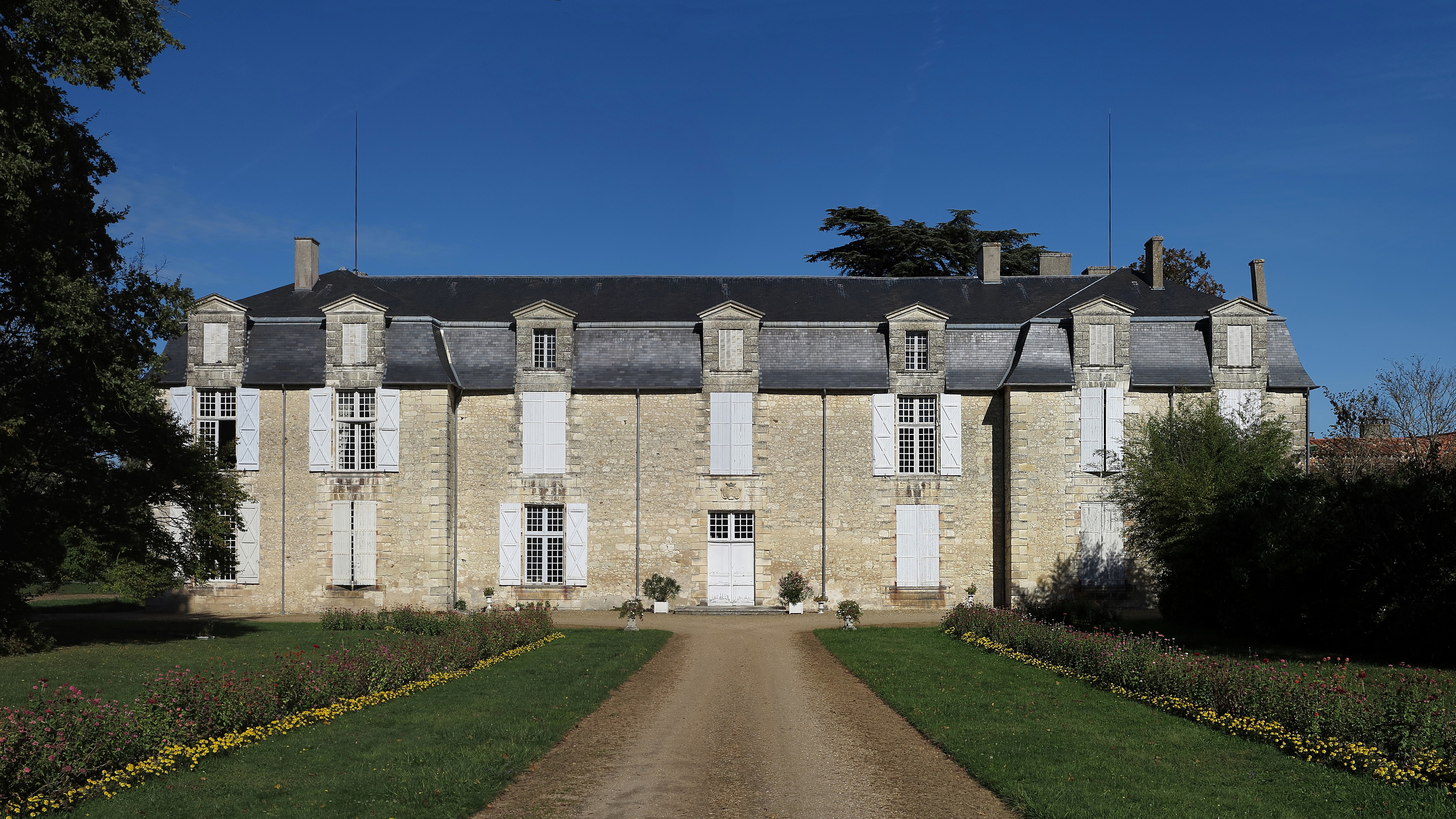 Le château de Cumond .